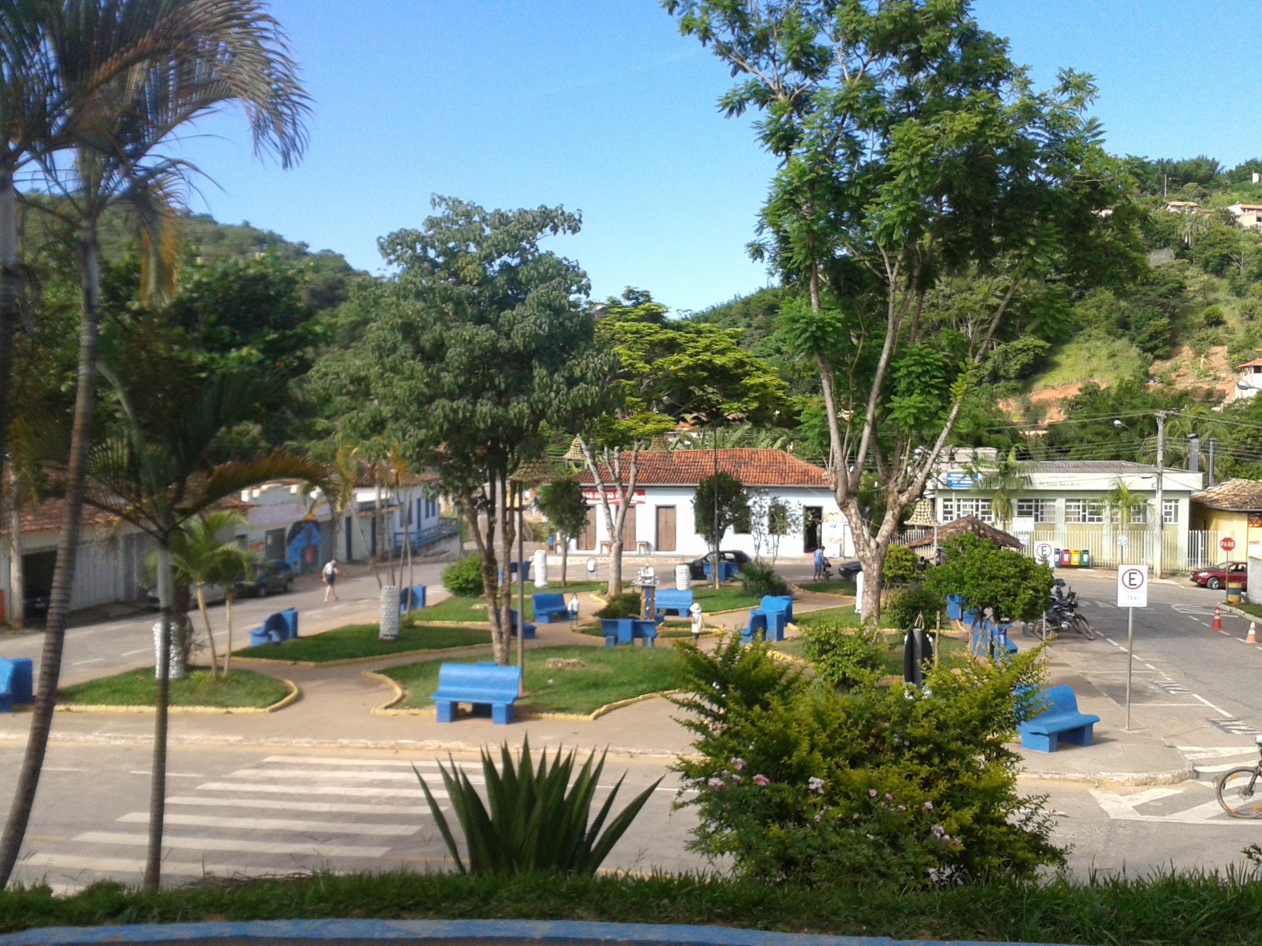 Foto da Praça Augusto Guerra em Ipoema (Itabira-MG)